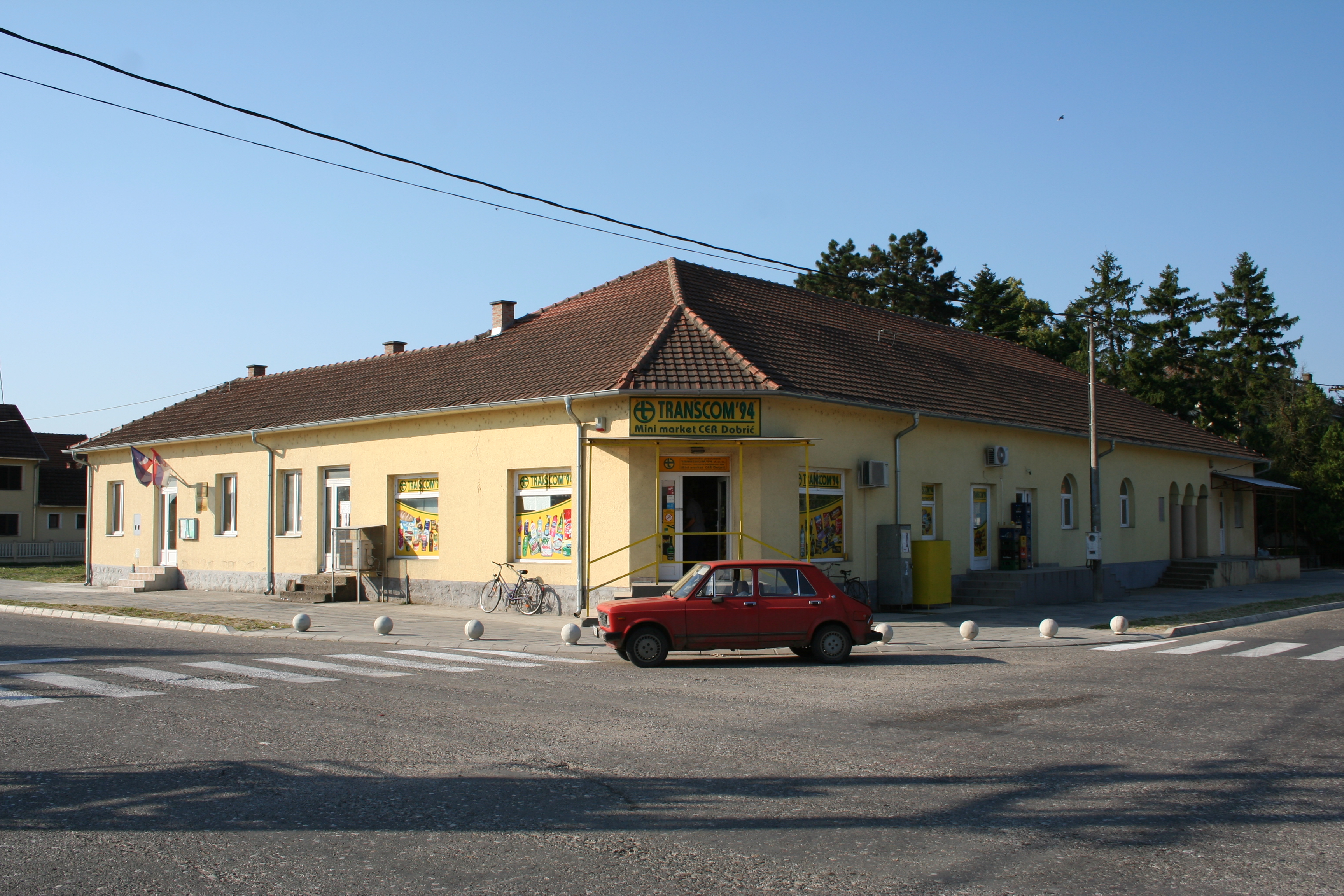 Dom kulture, Dobrić